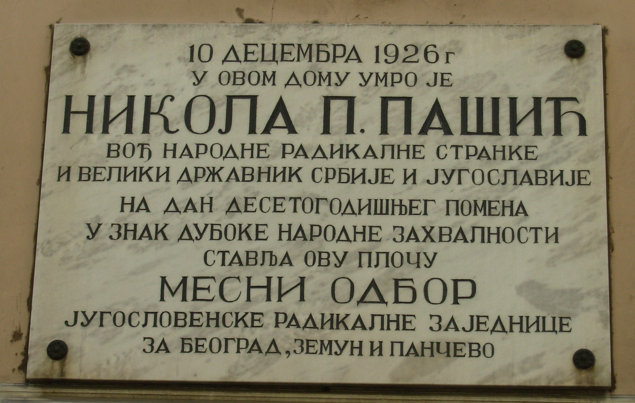 Табла на згради у којој је живео у умро Никола Пашић. Сликао Голдфингер